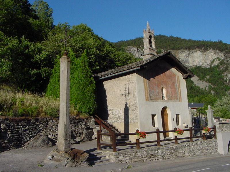 Chapelle Notre-Dame-de-la-Pitié du cimetière de Saint-André, Savoie.